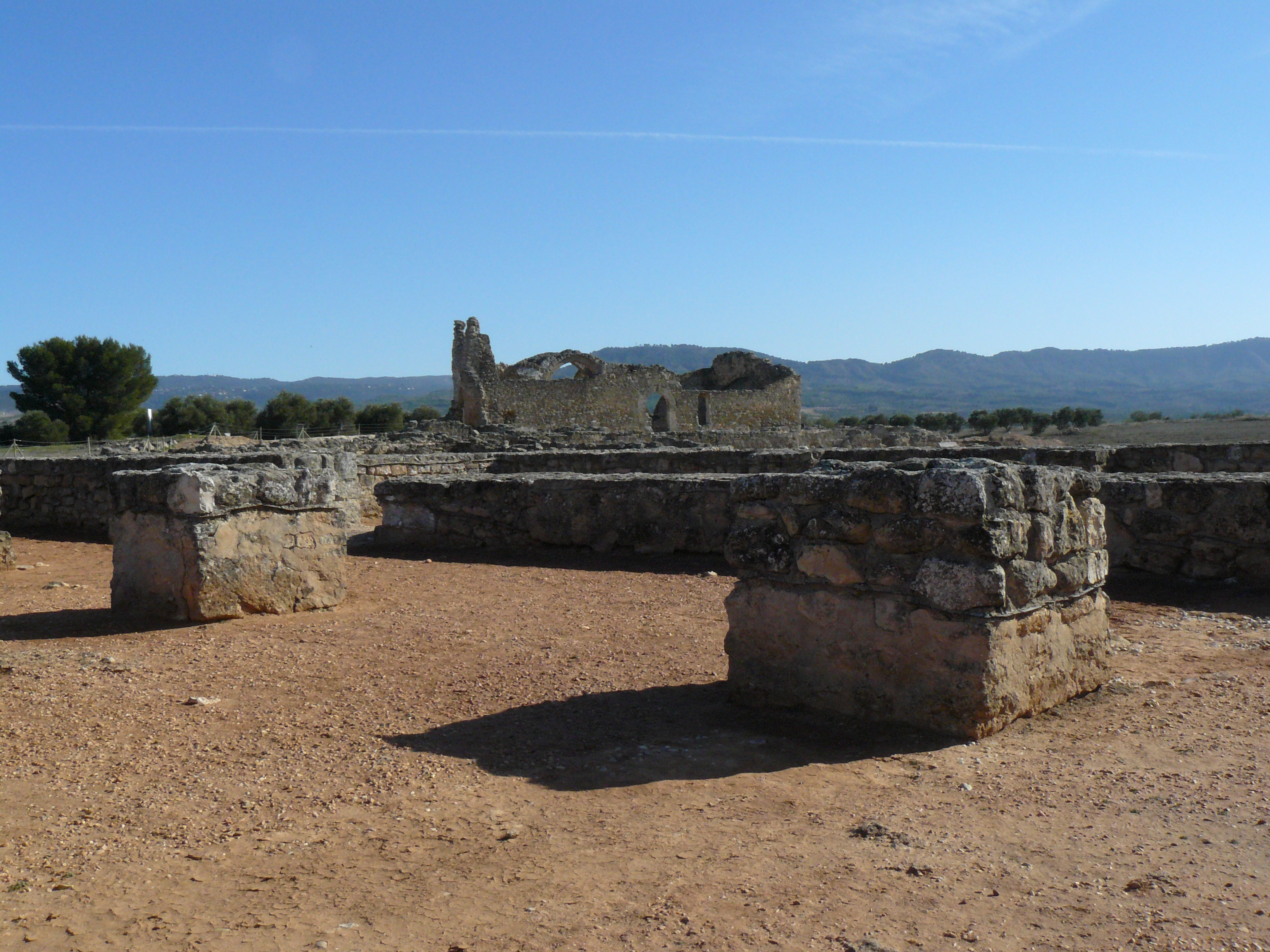 Vista de las ruinas de Recópoli en Zorita de los Canes, Guadalajara.